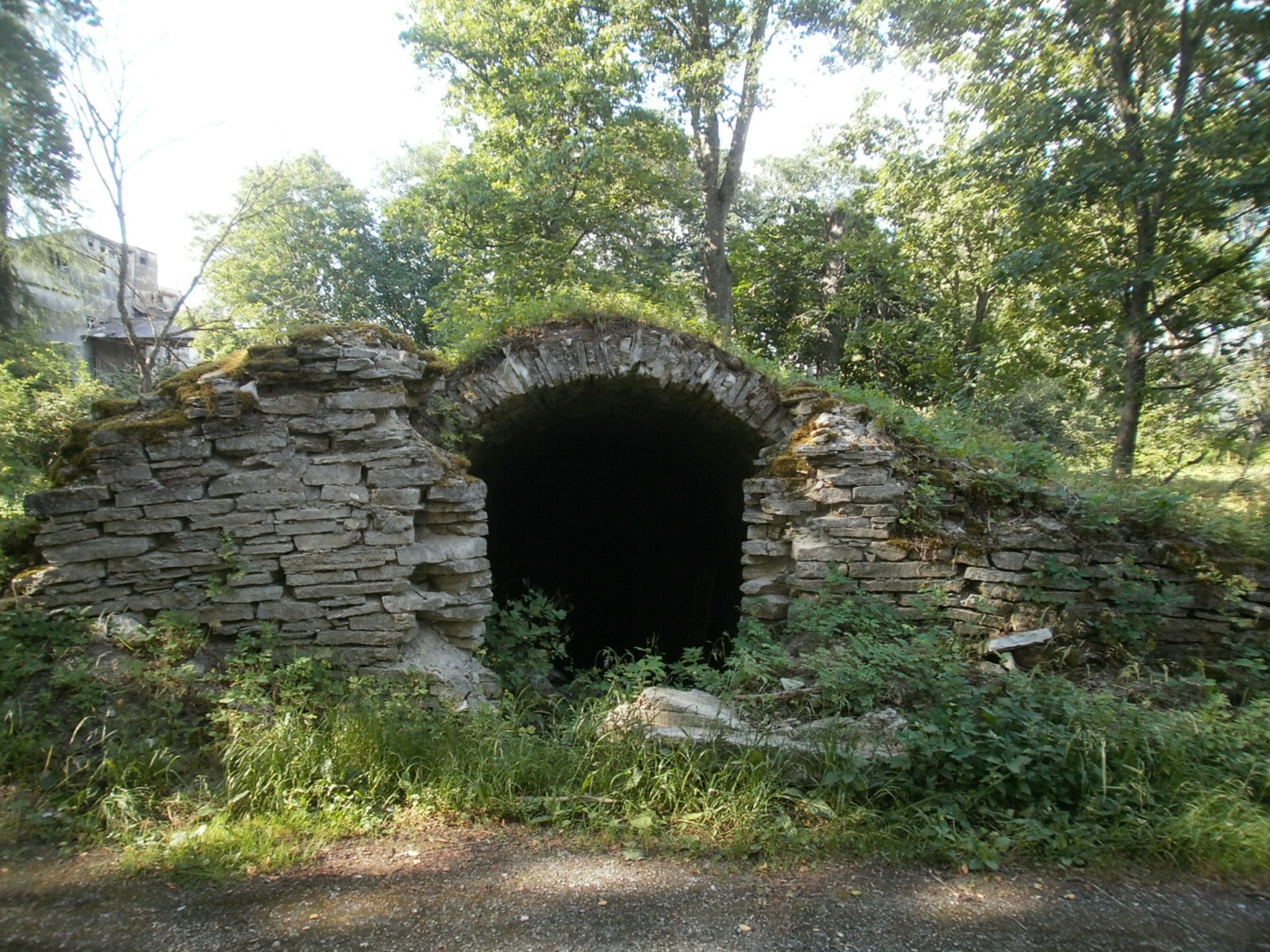 Tünnvõlvidega kelder Kasti mõisa kõrval